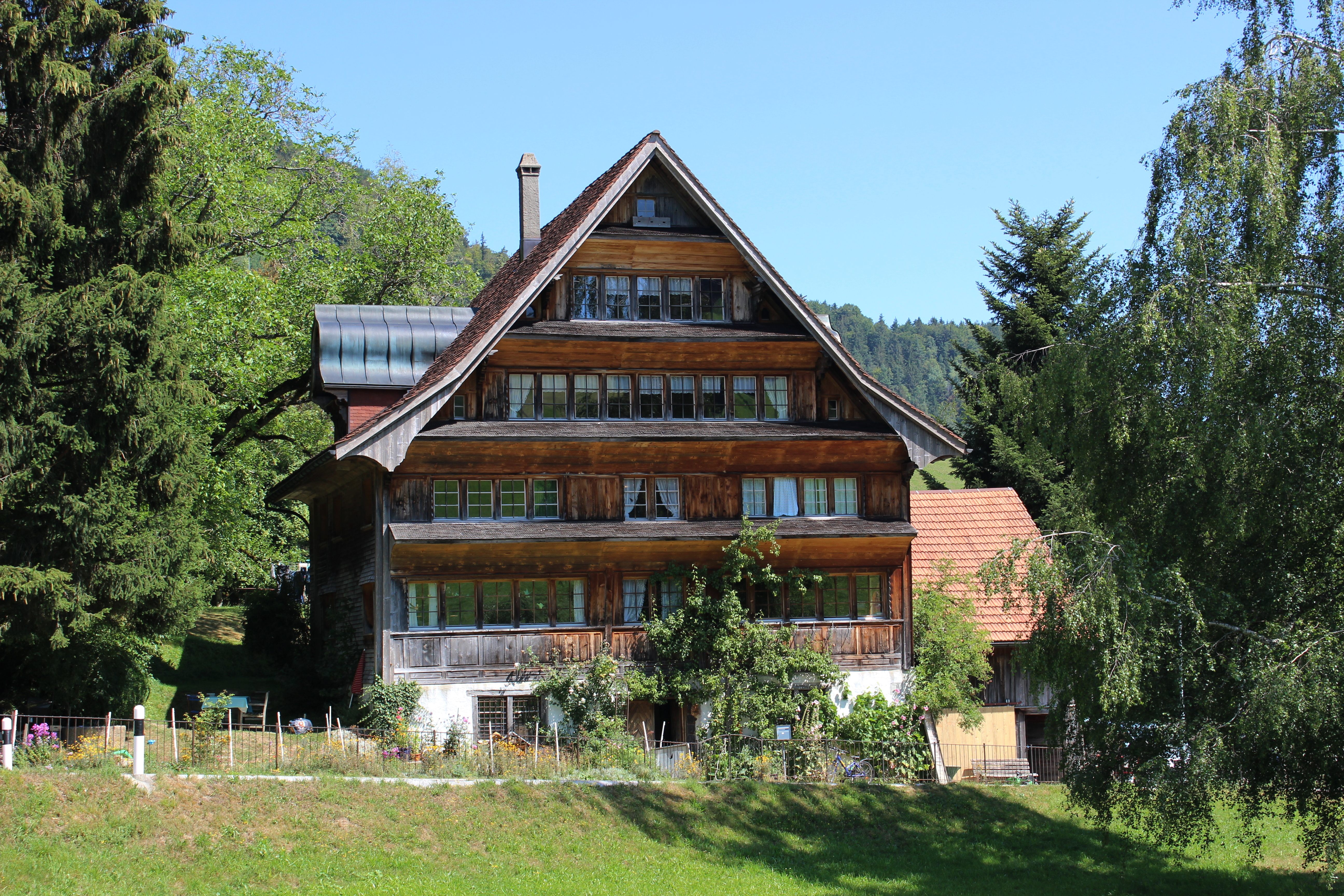 Wohnhaus, Quelle 65, Krinau, Schweiz